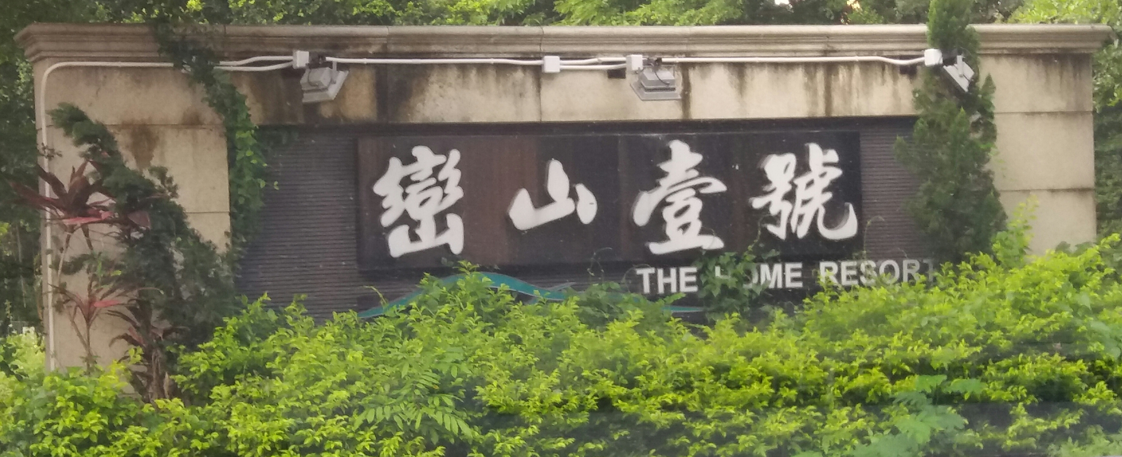 中文（香港）: 巒山壹號入口路標